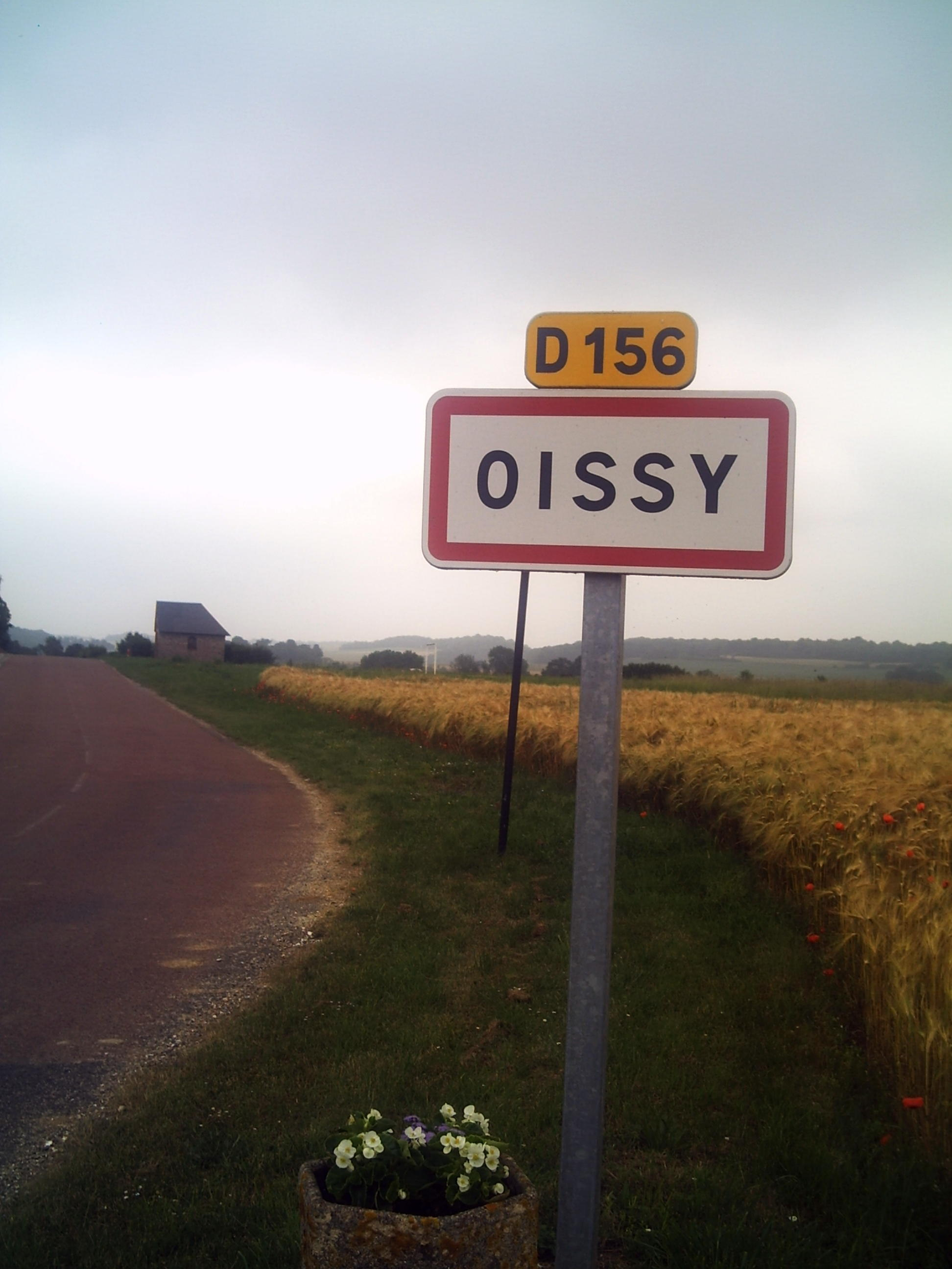 panneau